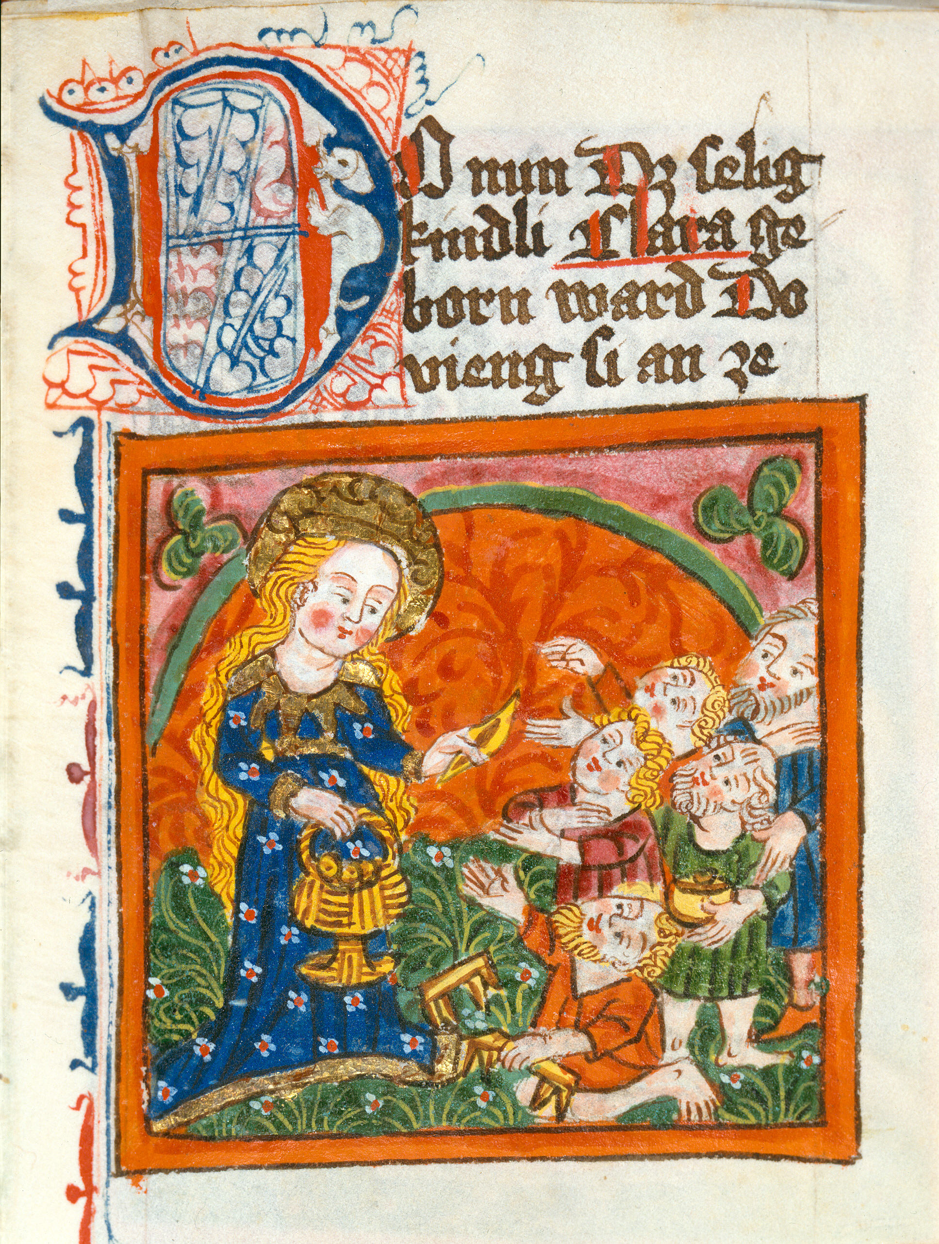 Die heilige Klara verteilt Almosen. Badische Landesbibliothek, Karlsruhe, Codex Tennenbach 4, fol. 17r